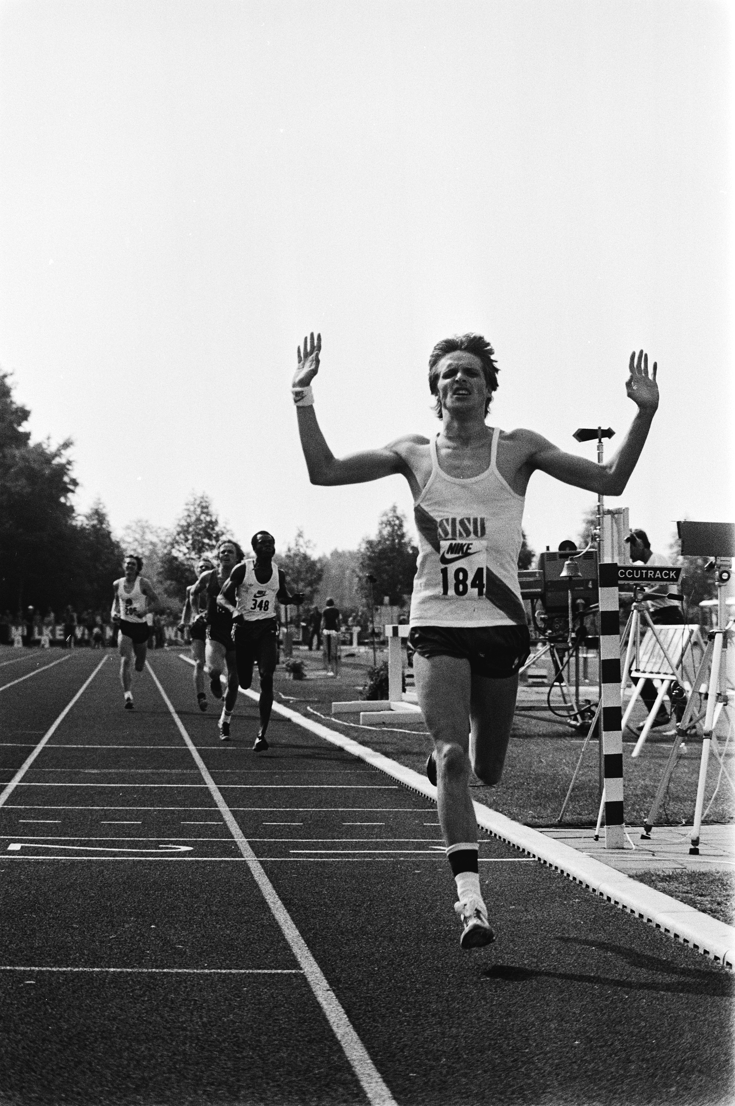 Collectie / Archief : Fotocollectie Anefo Reportage / Serie : Nederlandse Kampioenschappen Atletiek 1979, Nijmegen Beschrijving : Arno Körmeling finisht als eerste op de 800 meter Datum : 11 augustus 1979 Locatie : Gelderland, Nijmegen Trefwoorden : atletiek, sport, wedstrijden Persoonsnaam : Körmeling, Arno Fotograaf : Suyk, Koen / Anefo Auteursrechthebbende : Nationaal Archief Materiaalsoort : Negatief (zwart/wit) Nummer archiefinventaris : bekijk toegang 2.24.01.05 Bestanddeelnummer : 930-3949